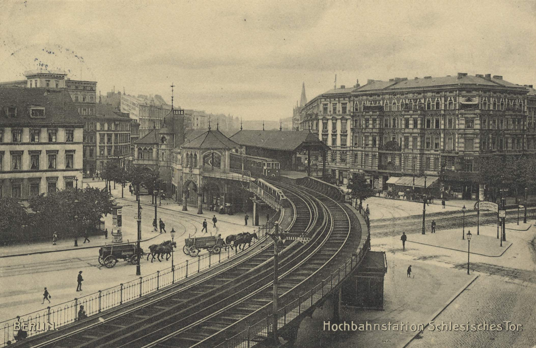 Blick von Nordosten auf den U-Bahnhof Schlesisches Tor in Berlin-Kreuzberg